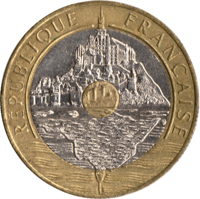 avers d'une pièce de 20 Francs Mont-Saint-Michel 1992